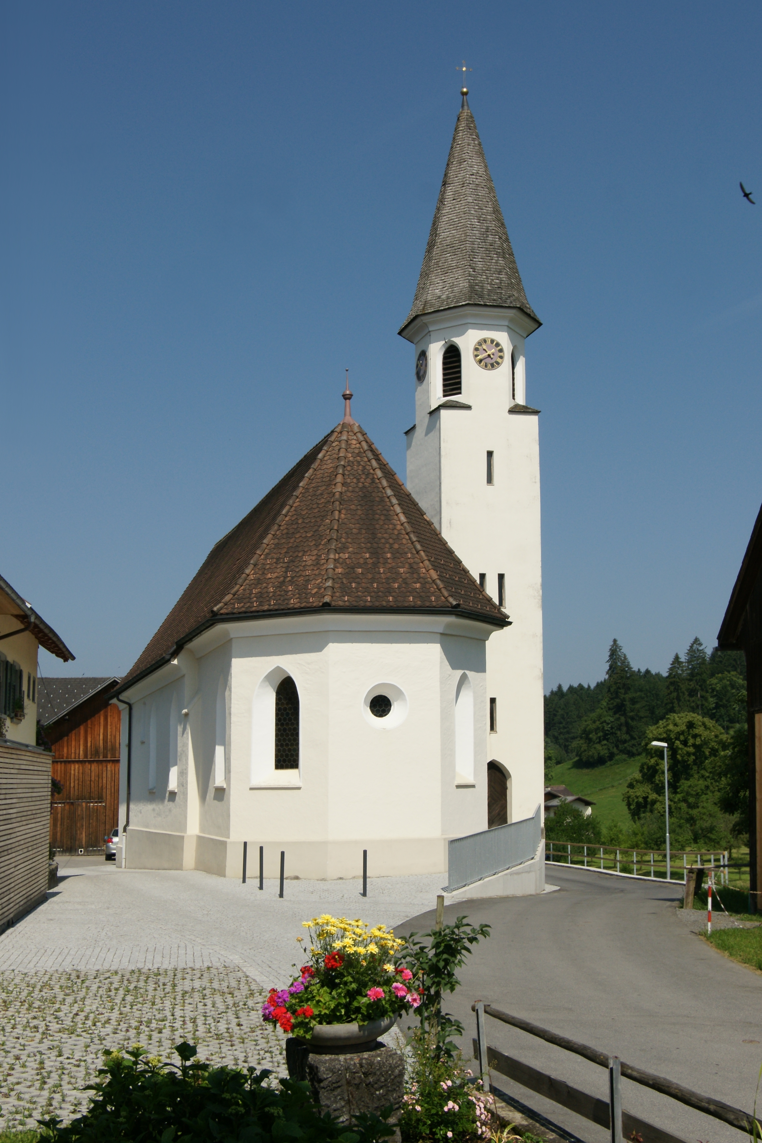 Filialkirche "Hl. Magnus" in Röns.